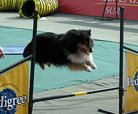 Un Sheltie Tricolor haciendo Agility